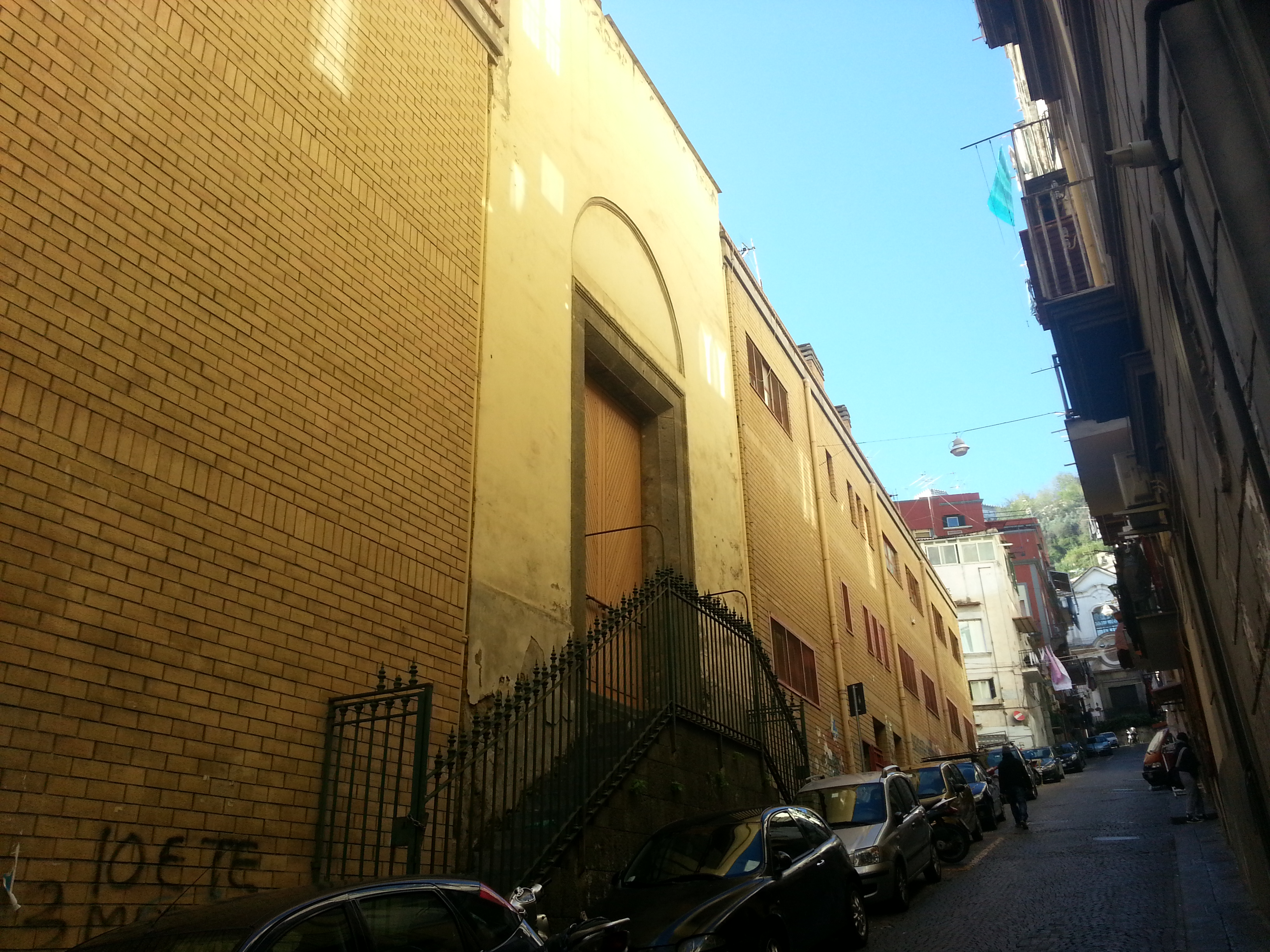 Complesso di Santa Maria dello Splendore